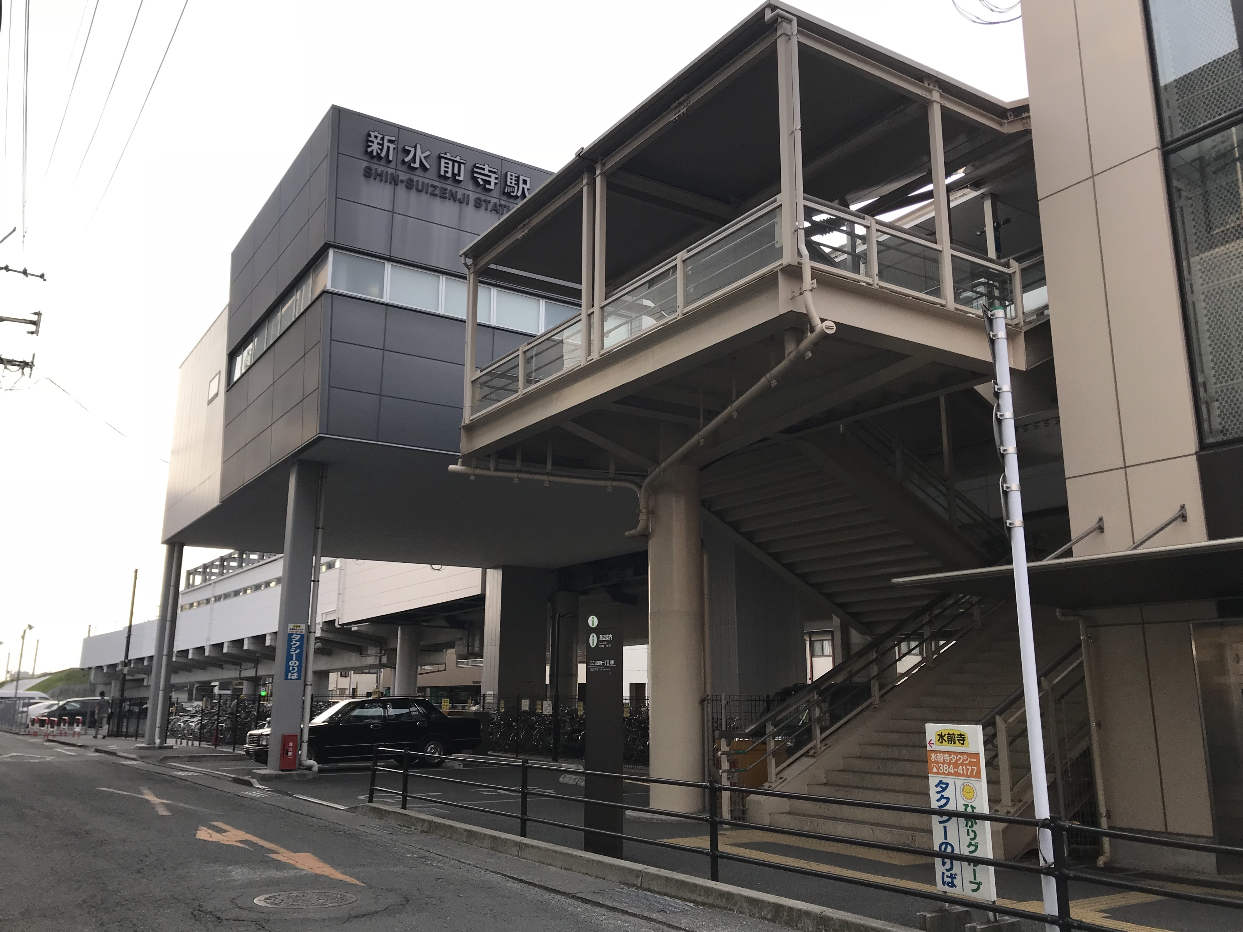 新水前寺駅の駅舎